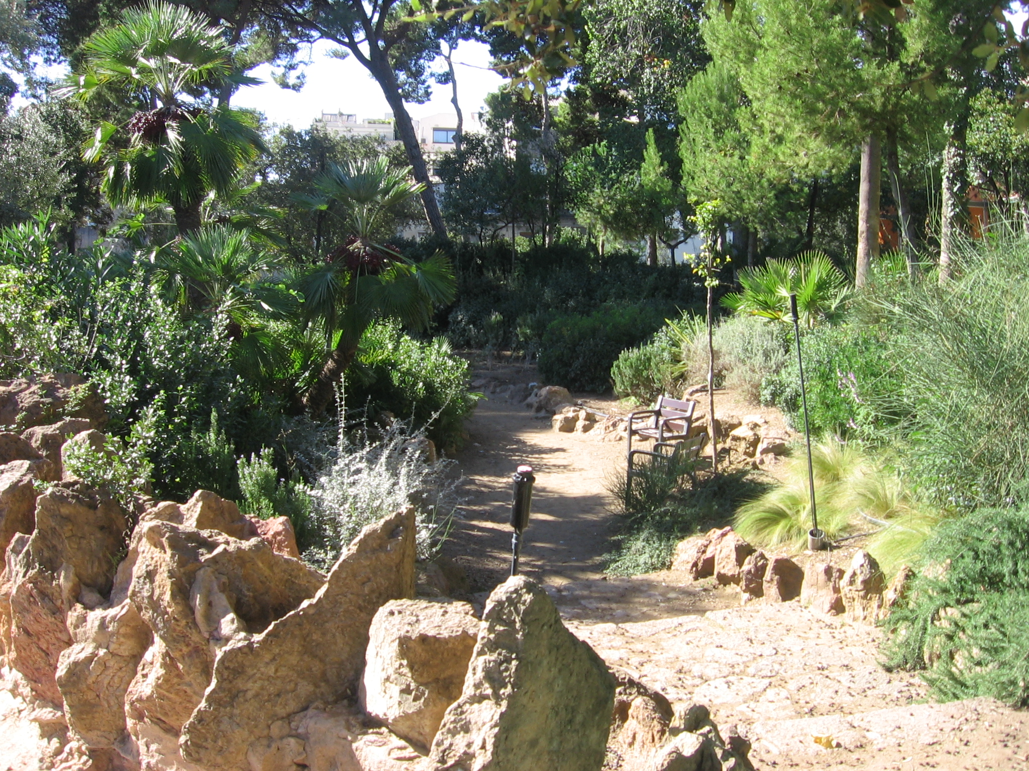 Parque de Monterols.